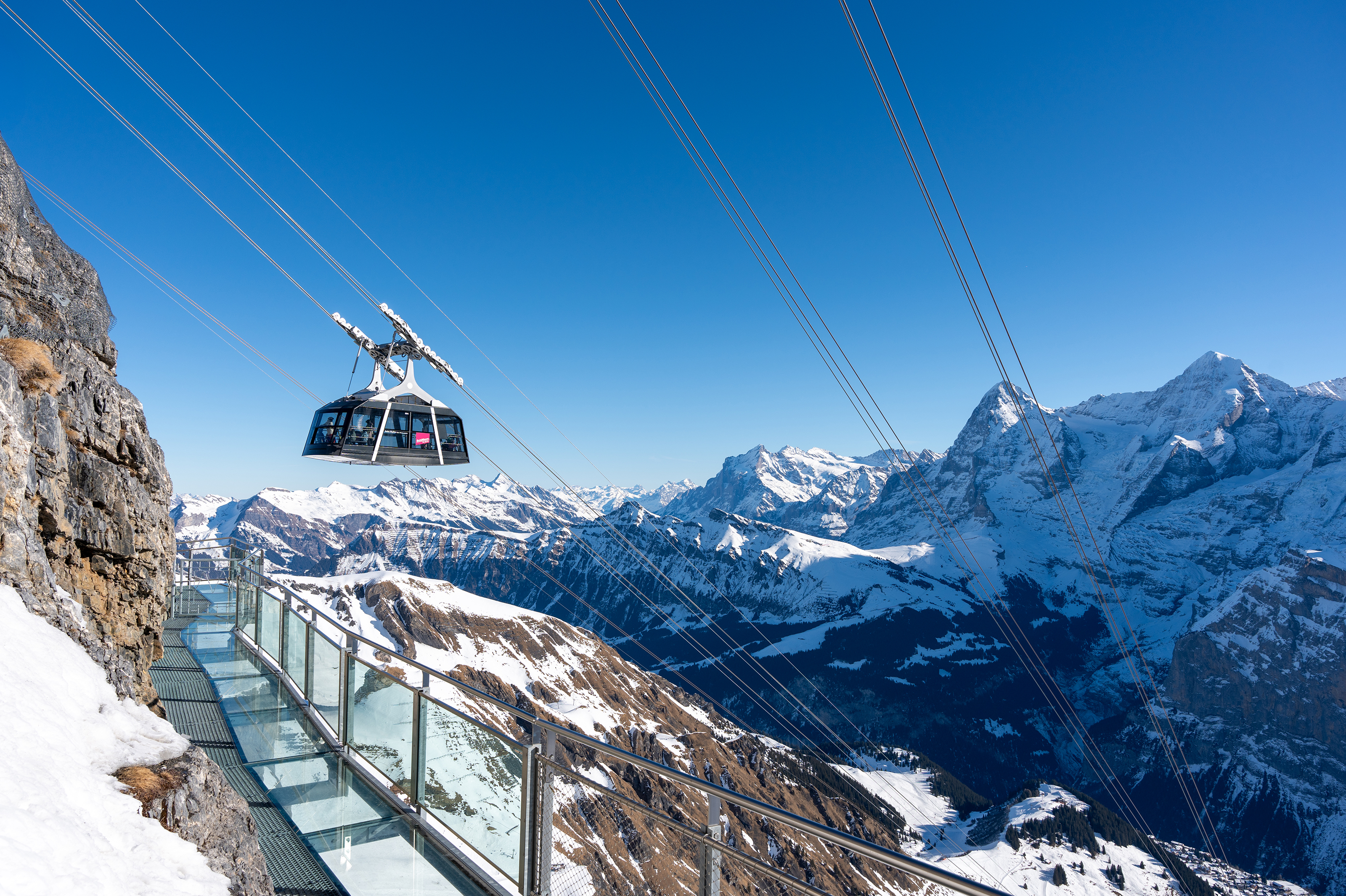 Kabine Schilthorn